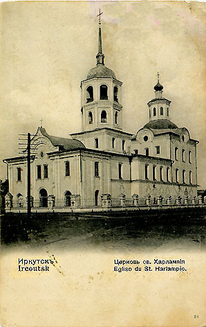 г. Иркутск. Церковь Св. Харлампия.